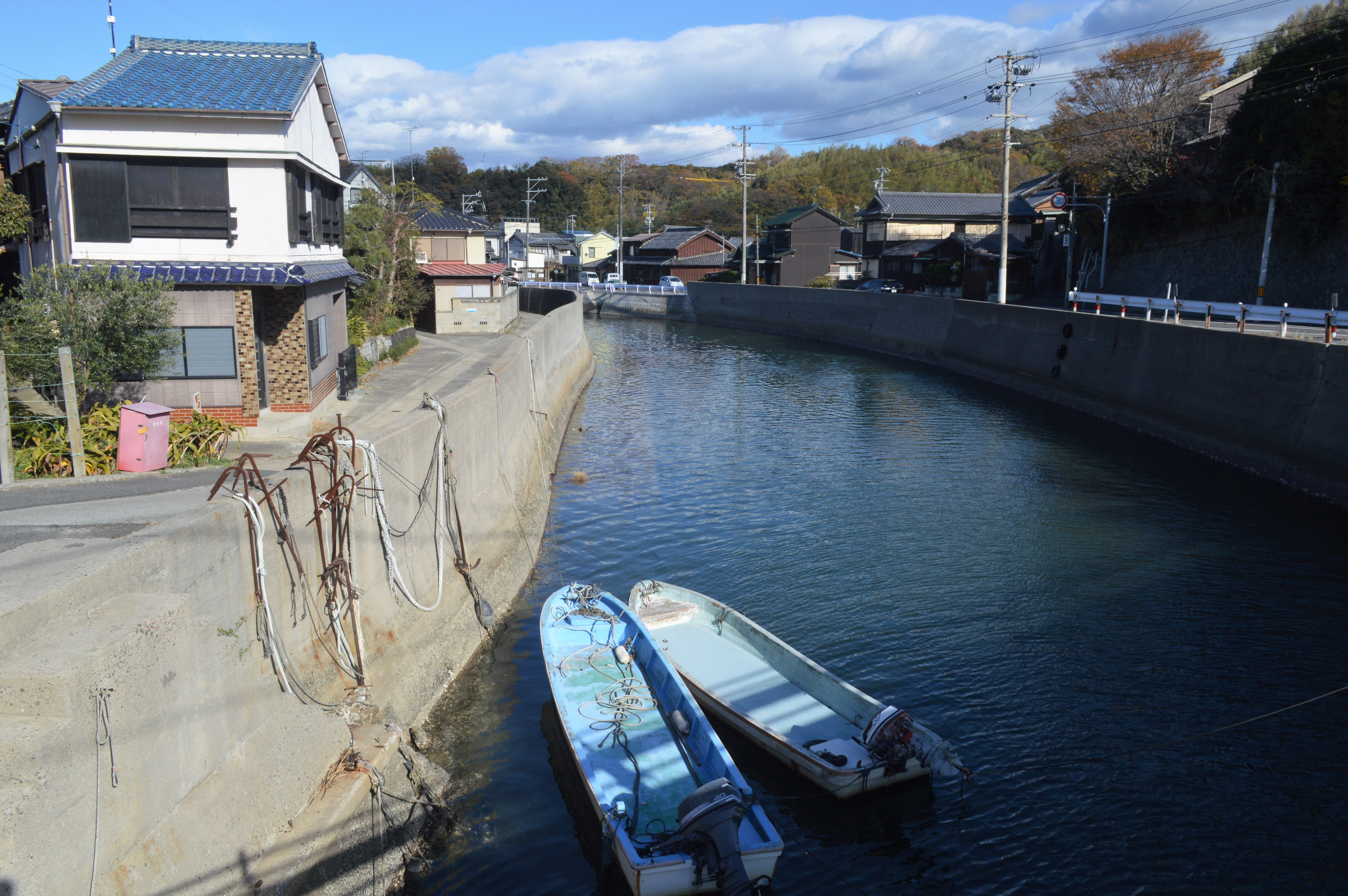 愛知県知多郡南知多町大字内海の内海川。